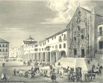 Hospital Real de Todos os Santos antes de 1755. Lisboa